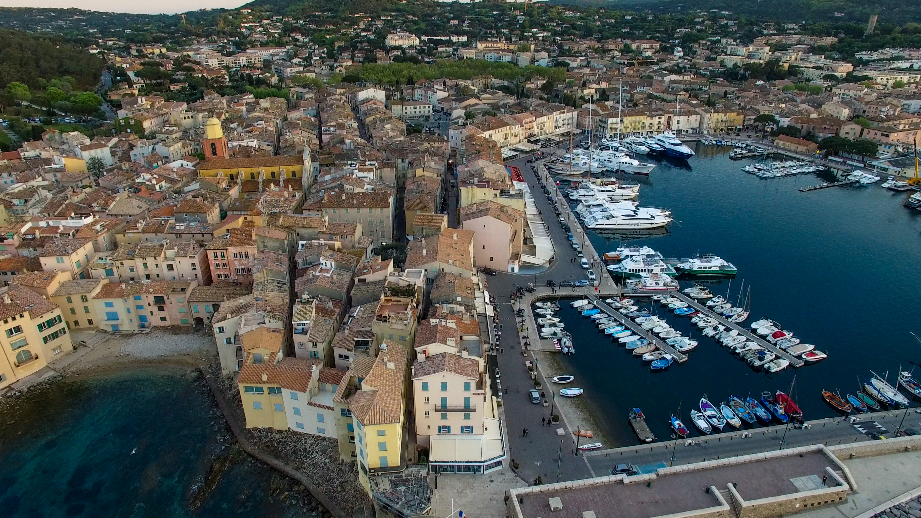 Saint-Tropez-20160411-06-1